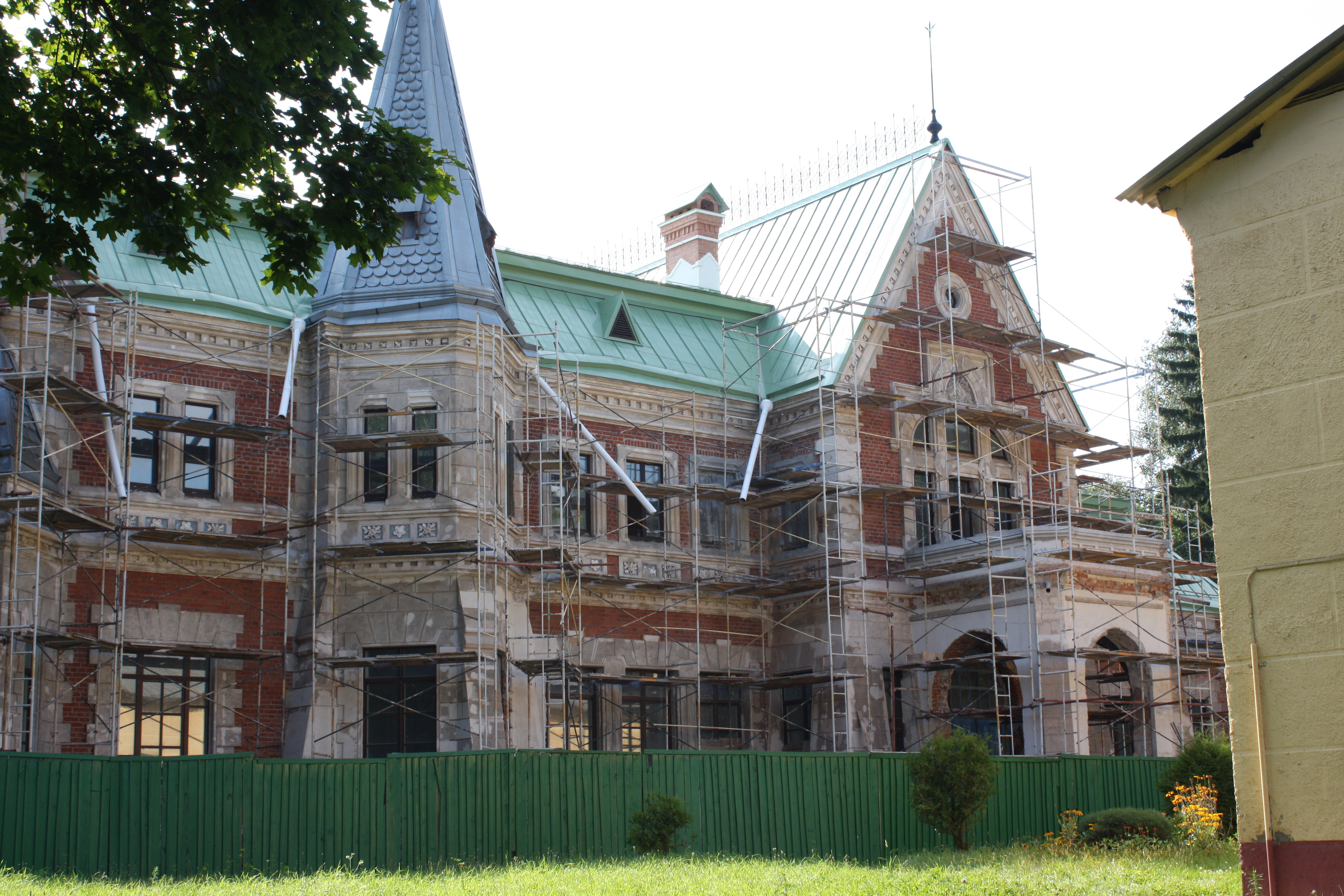 Беларуская (тарашкевіца): Палацава-паркавы комплекс Козелаў-Паклеўскіх. в. Красны Бераг This is a photo of Belarusian heritage monument. Reference number: 312Г000324 ( WLM)